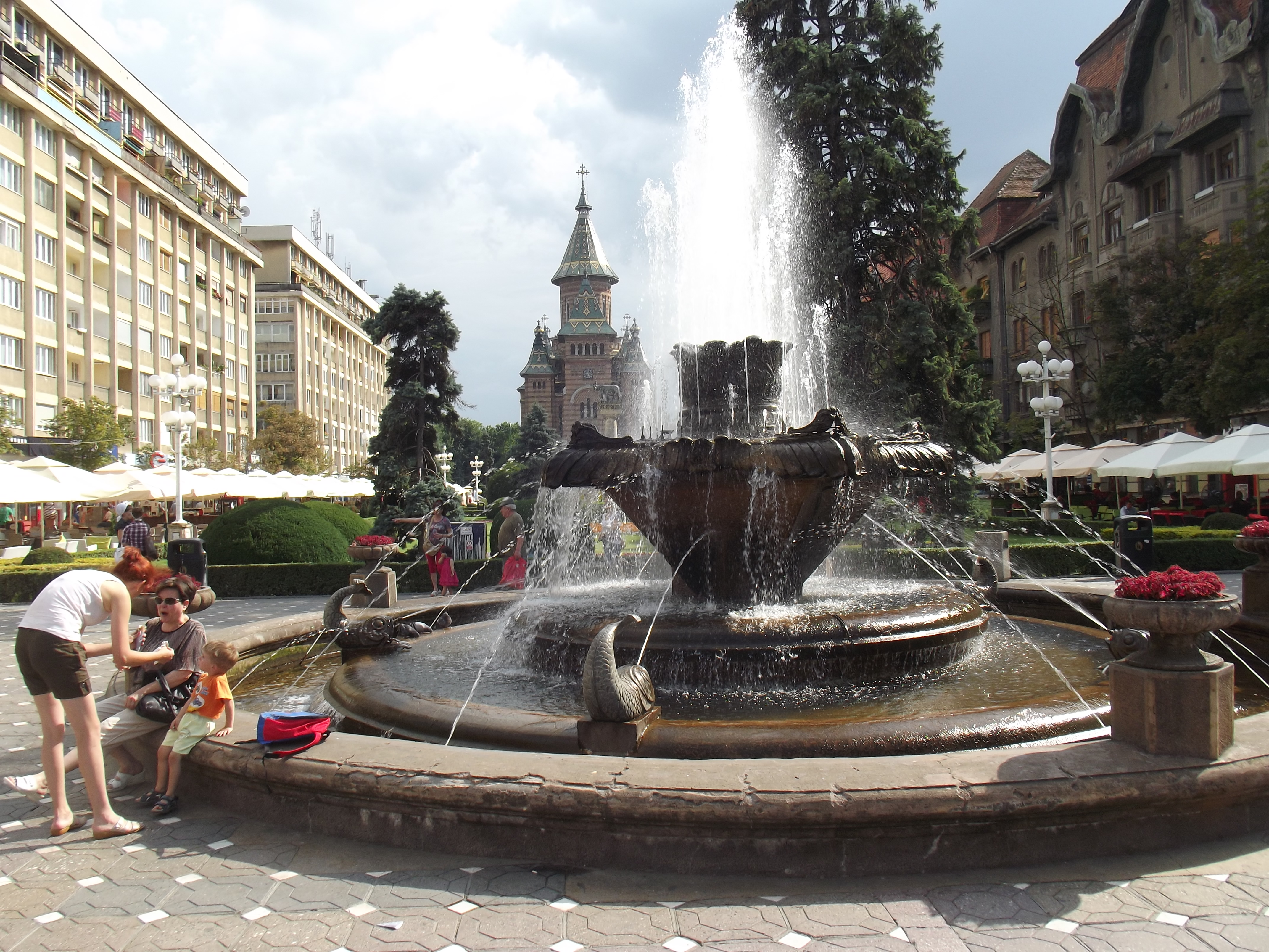 Fontein bij Victorieplaats